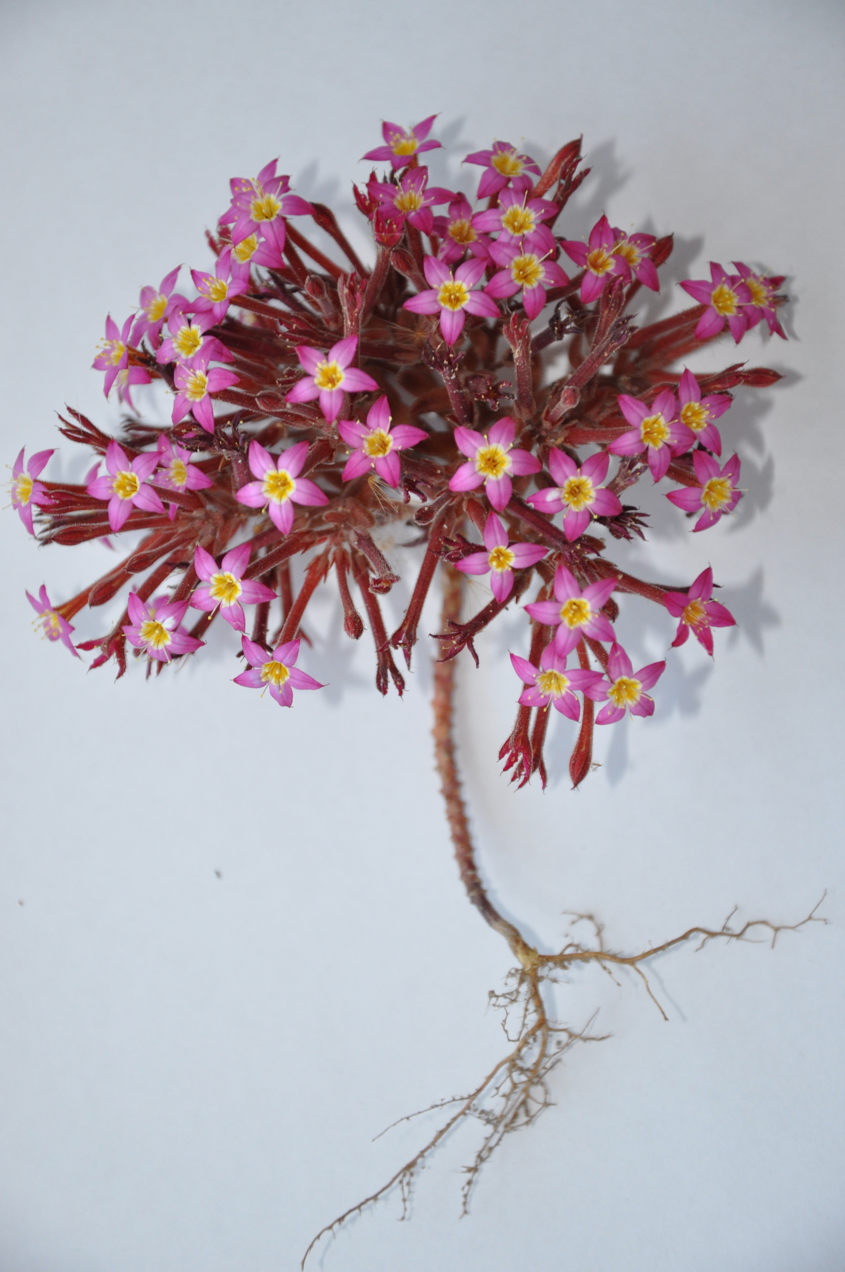 Uña de gato (Pistorinia hispanica) en Punta de la Cabeza, Ceuta, España.